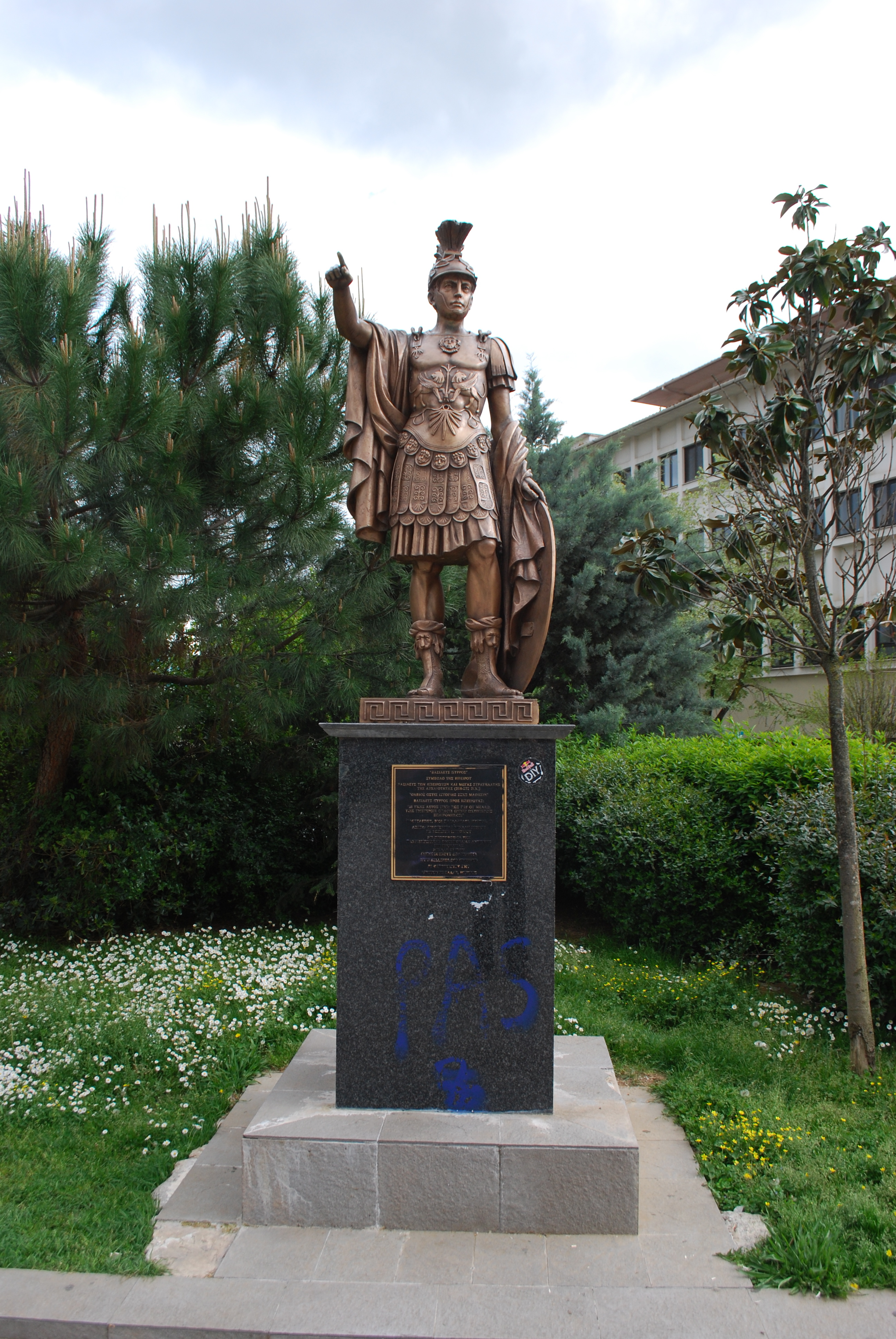 Vue de Ioannina.